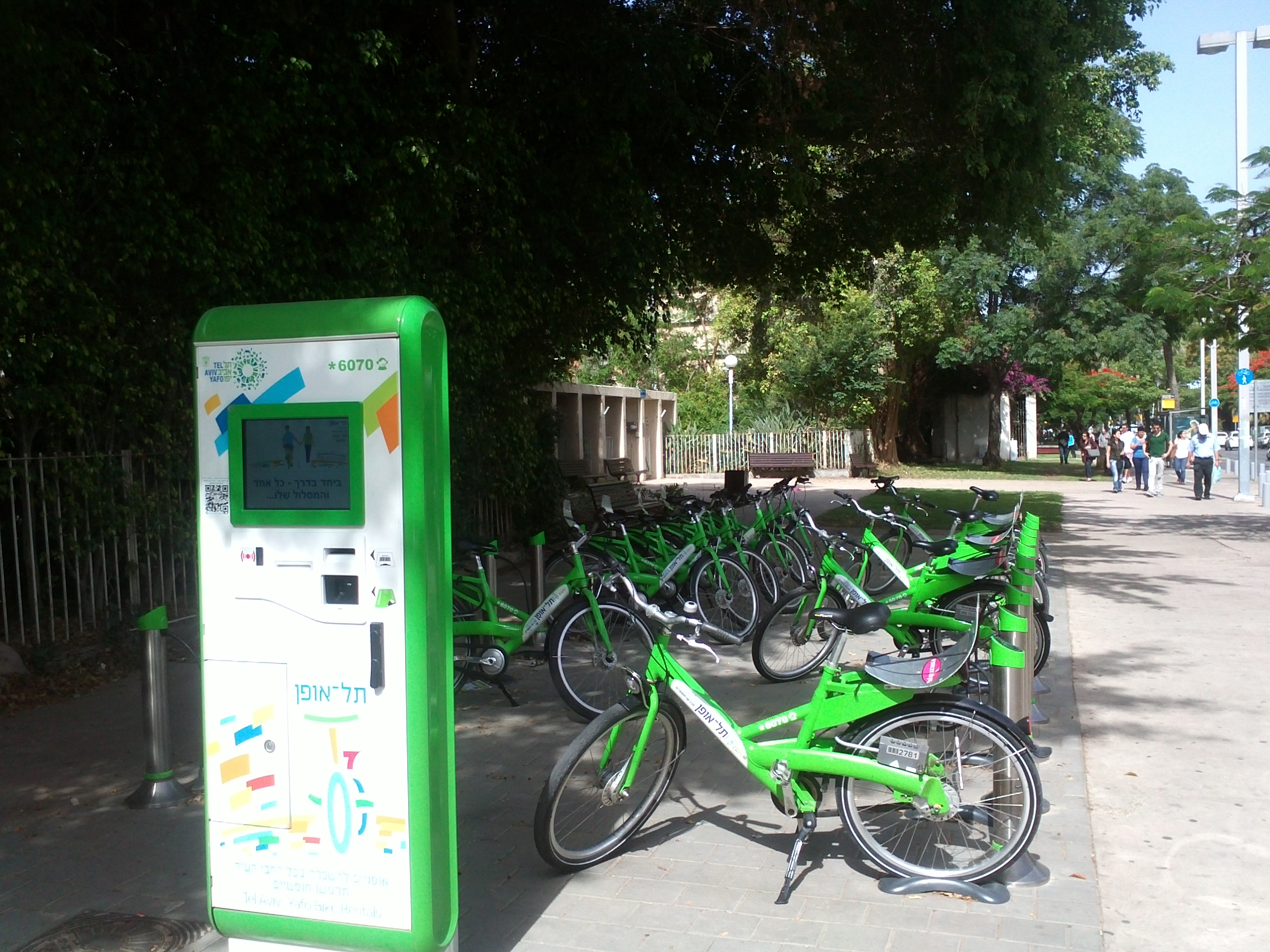 Тель-Авив, май 2013. Аренда велосипедов